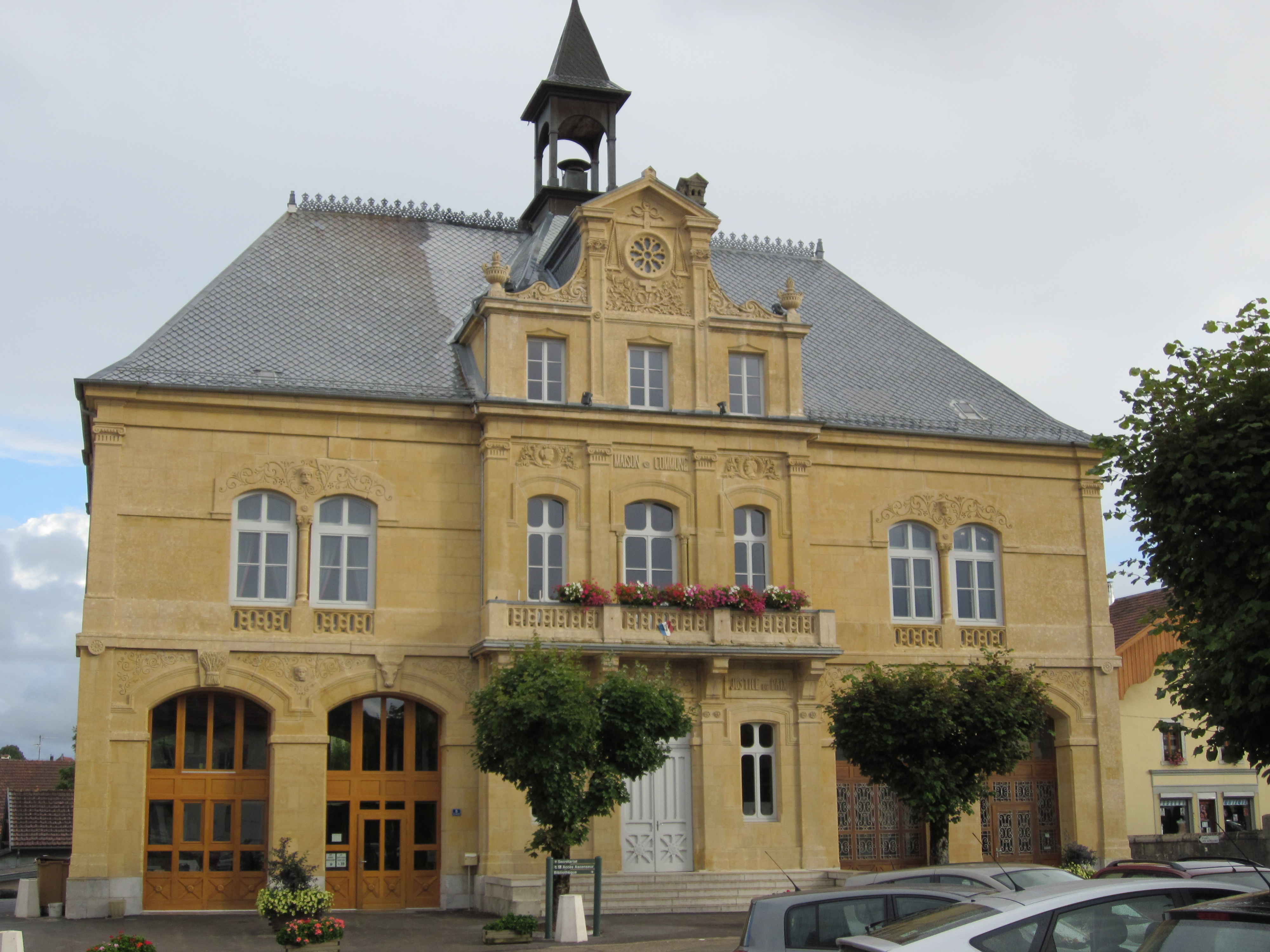 mairie de Le Russey (département du Doubs)